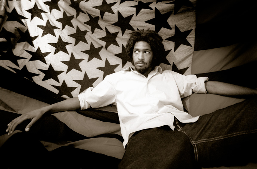 Rapper Sekou in Berlin 2002